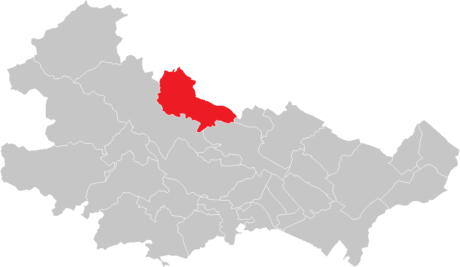 Bezirk Baden